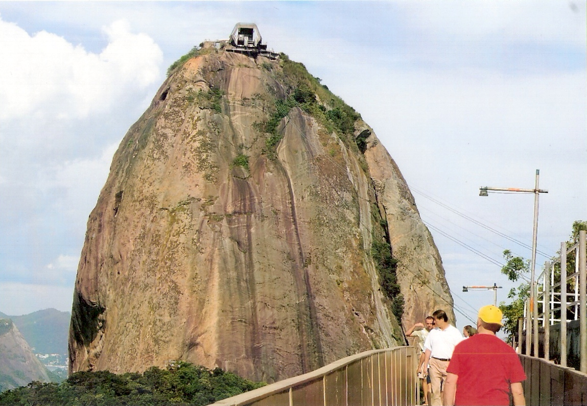 Pão de Açúcar (Głowa Cukru) w Rio de Janeiro w Brazylii